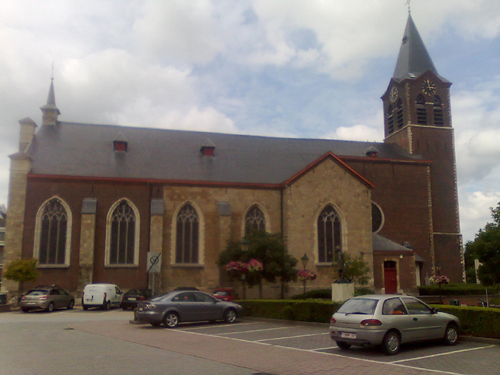 Kerk van Mere (in Erpe-Mere)